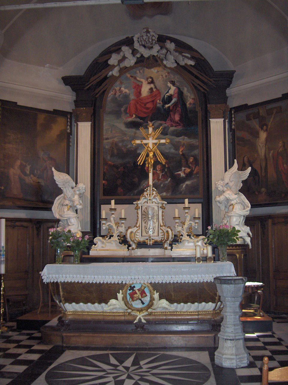 high altar in the Onze-Lieve-Vrouw-ter-Duinenkerk; Ostend, Belgium